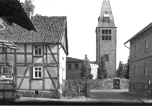 Die Gombether Kirche